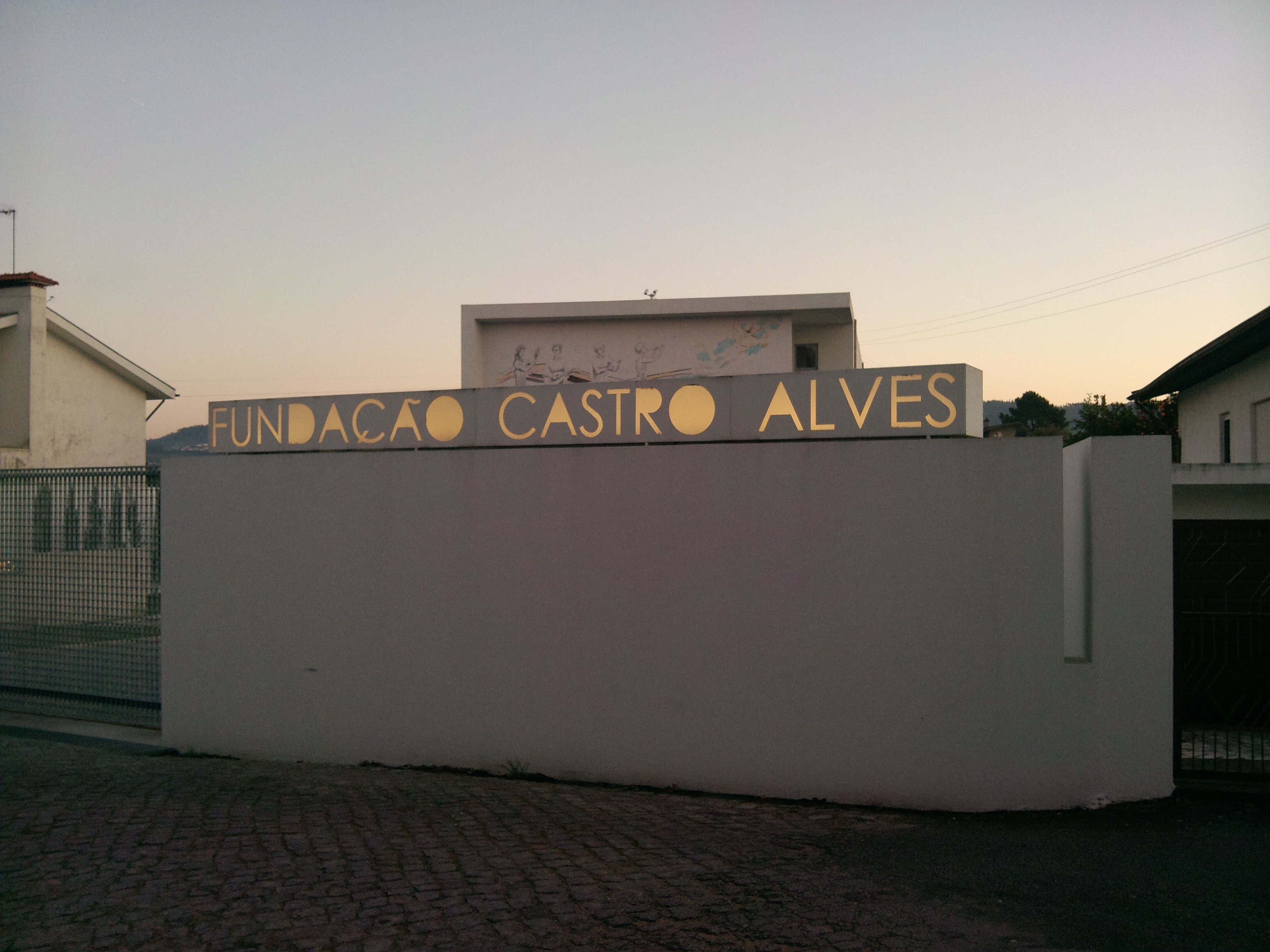 Fundação Castro Alves